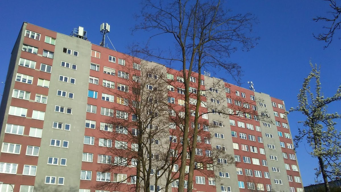 Niebrów, wieżowiec przy Stanisława Dubois 1 w Tomaszowie Mazowieckim, PL, EU. CC0